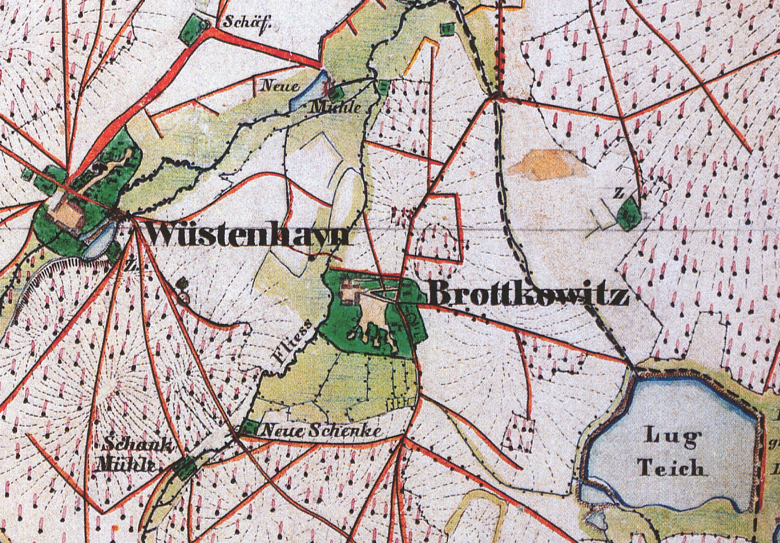 Brodtkowitz, Ortsteil der Gemeinde Kolkwitz, Landkreis Spree-Neiße, Brandenburg, und Wüstenhain, Ortsteil der Stadt Vetschau/Spreewald, Landkreis Oberspreewald-Lausitz, Brandenburg, Ausschnitt aus dem Urmesstischblatt 4250 Vetschau